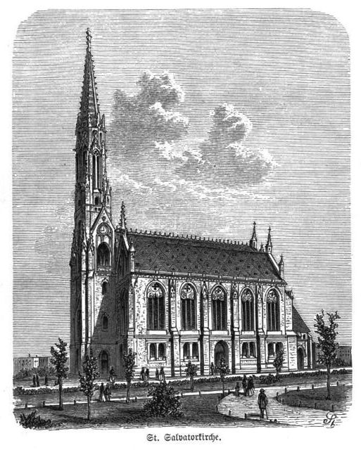 ehemalige evangelische Salvatorkirche in Breslau